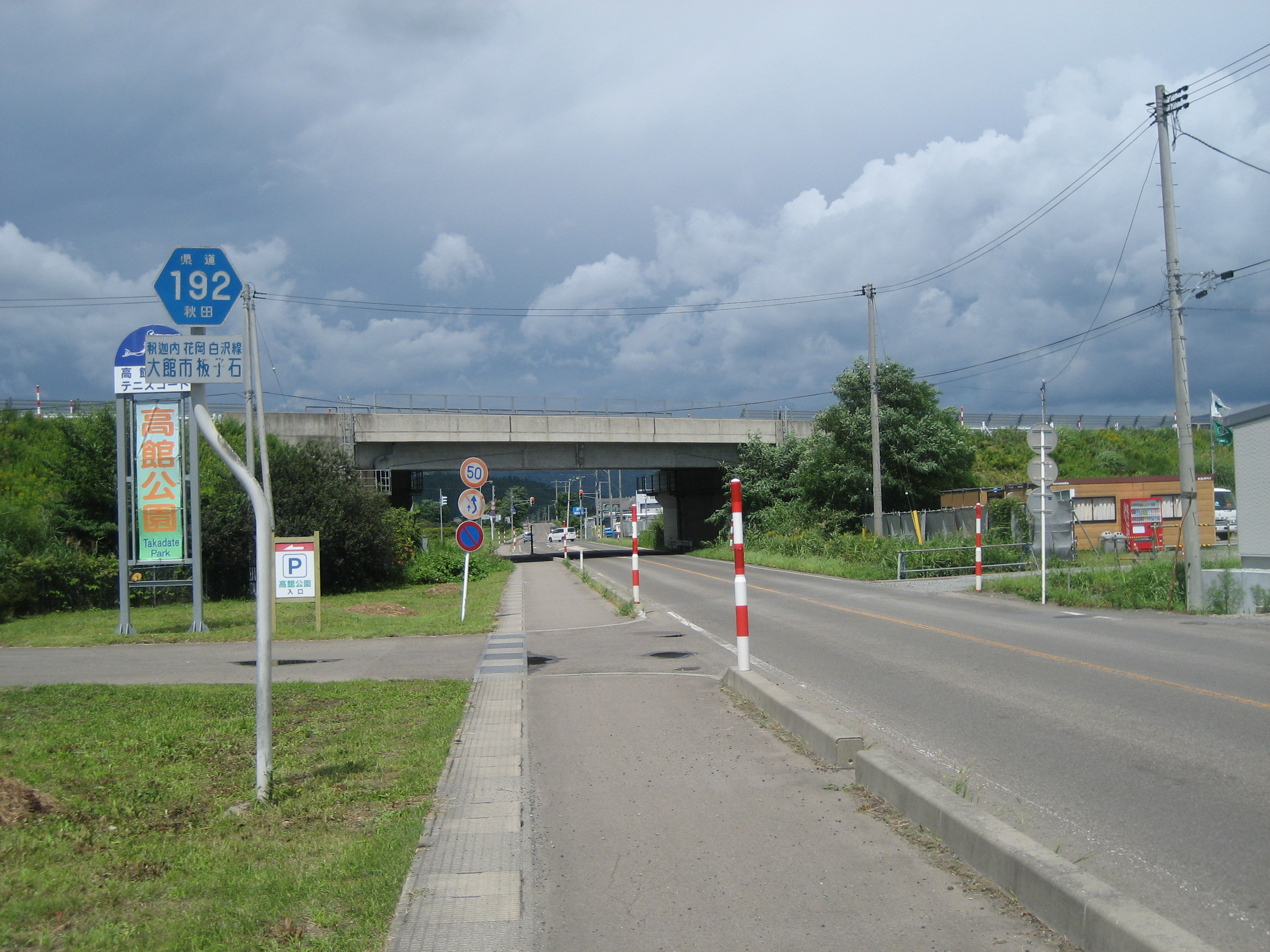 秋田県道192号線大館市板子石付近